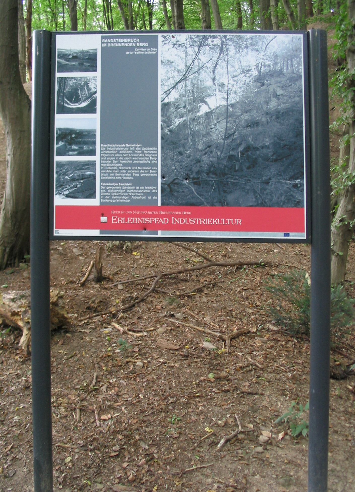 Beschreibung: Infotafel zum ehemaligen Sandsteinbruch im Brennenden Berg in Dudweiler (Saarbrücken/Deutschland). Photographer: kh80 Date: 2005-07-28 License: GFDL and cc-by-sa/2.0/de